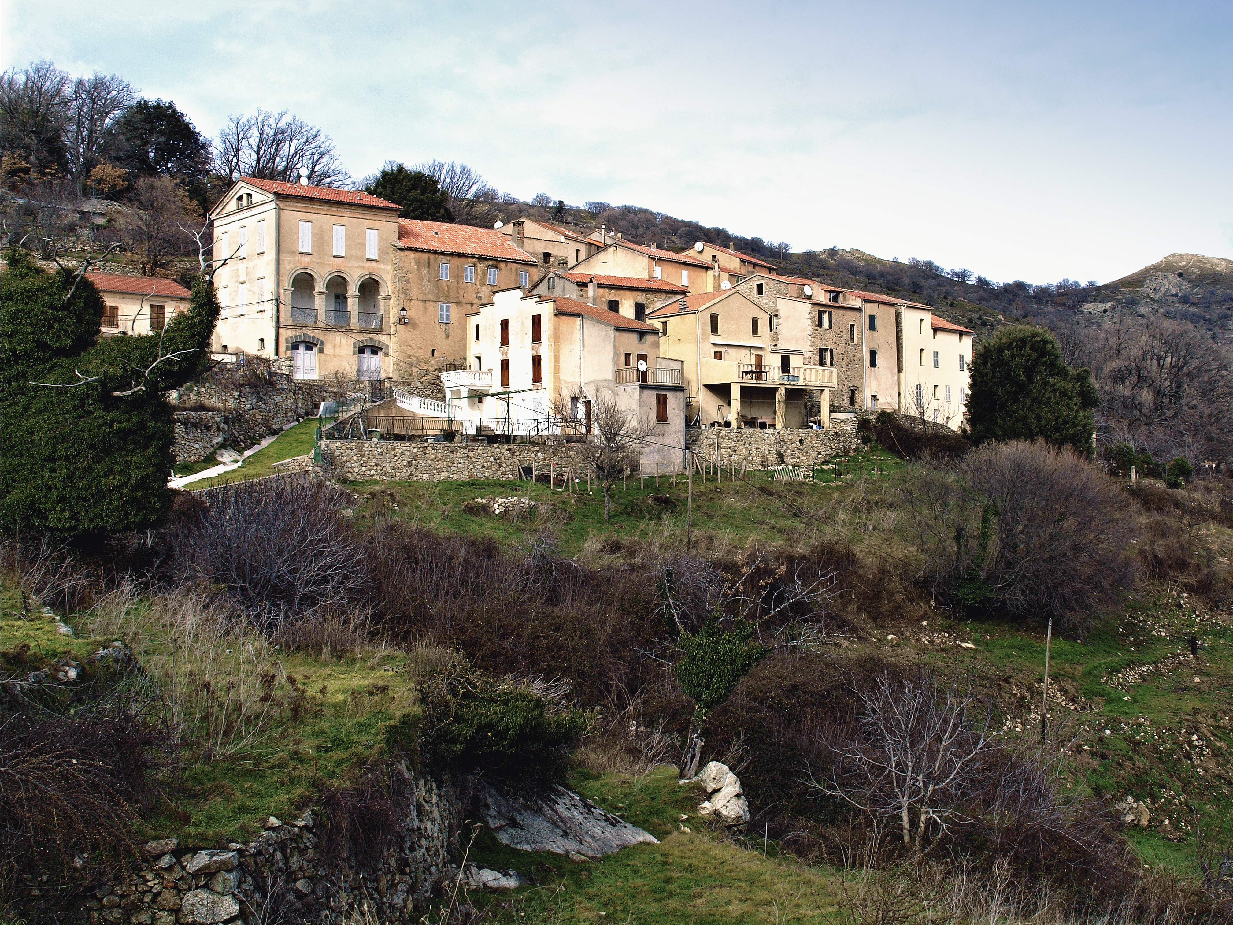 Pioggiola (Corsica) - Hameau de Carchisalti